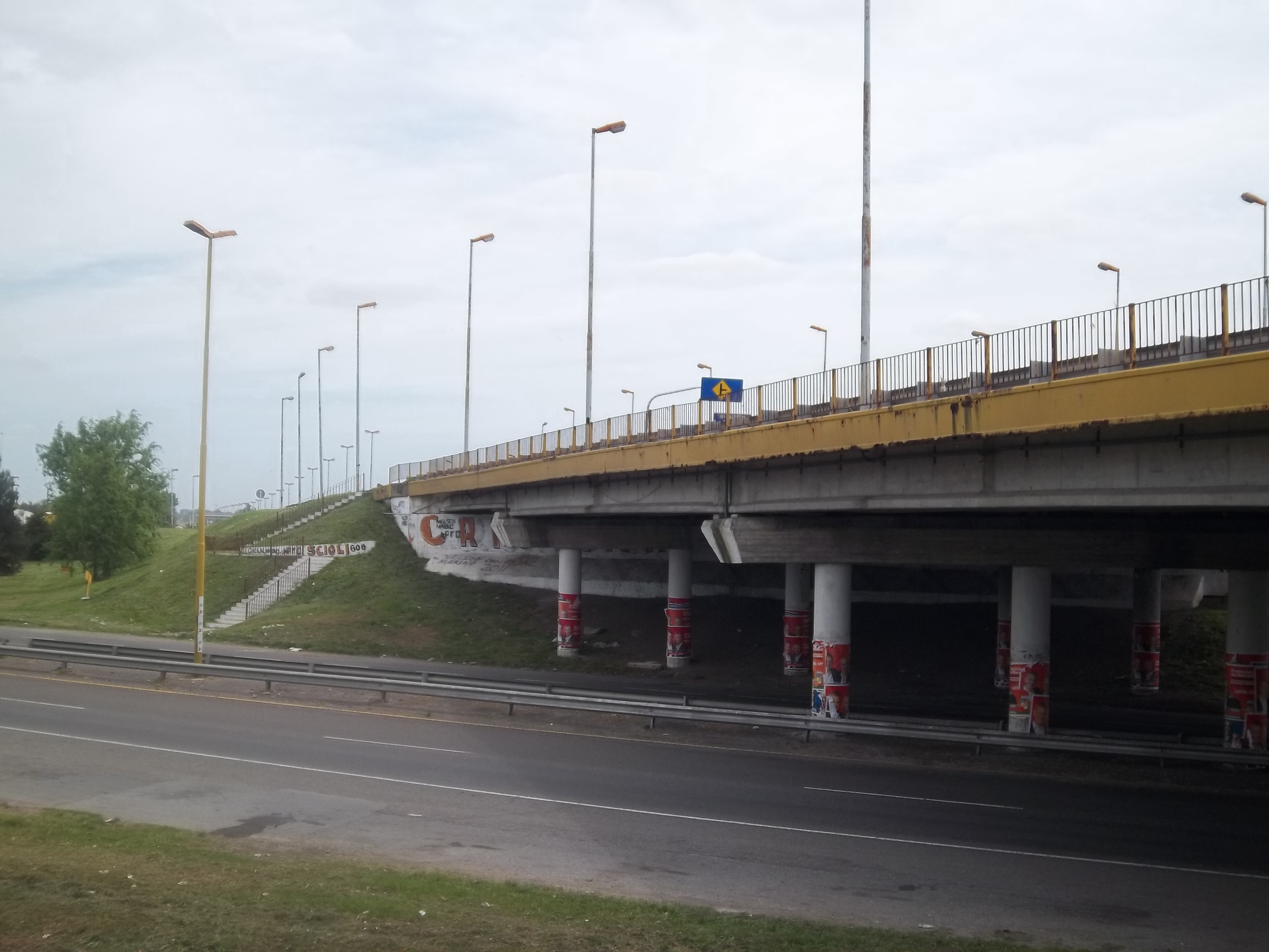 Distribuidor Etcheverry con el puente de la Ruta Provincial 215 sobre la Autovía 2 en Ángel Etcheverry, partido de La Plata, provincia de Buenos Aires, Argentina.